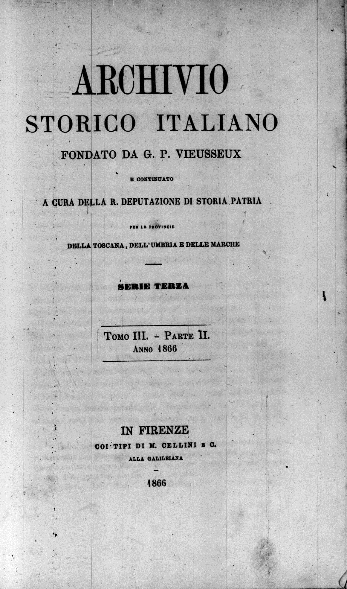 Frontespizio